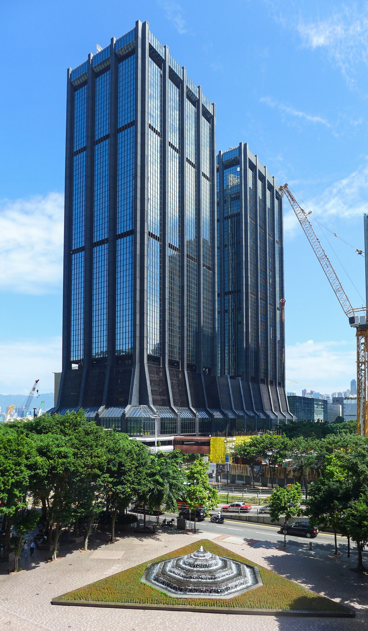 Harbour Centre